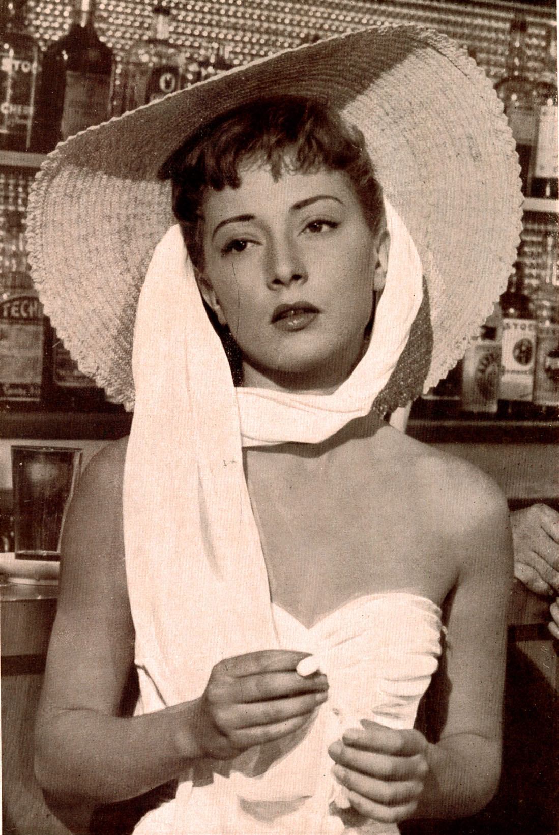 Rosy Mazzacurati attrice